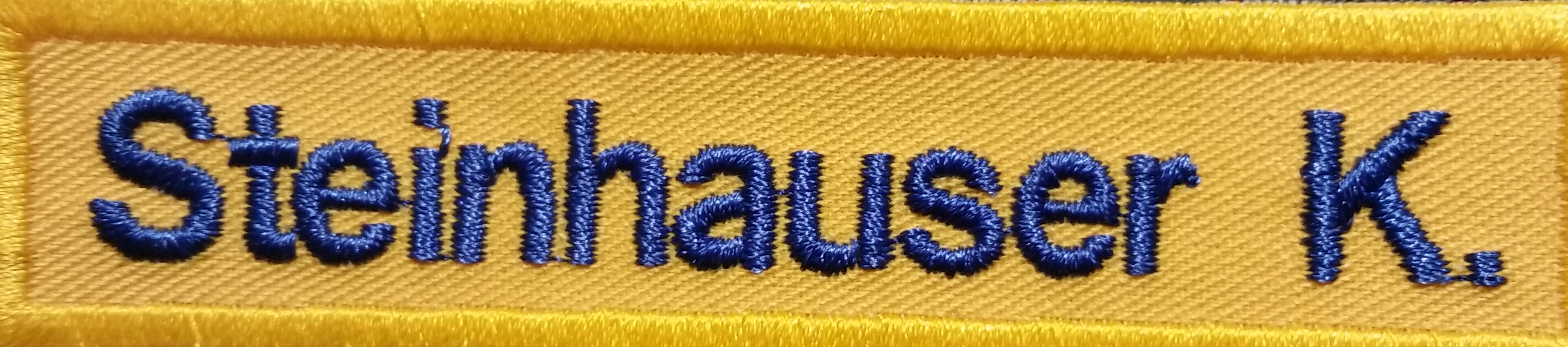 Gesticktes Namens-Schild